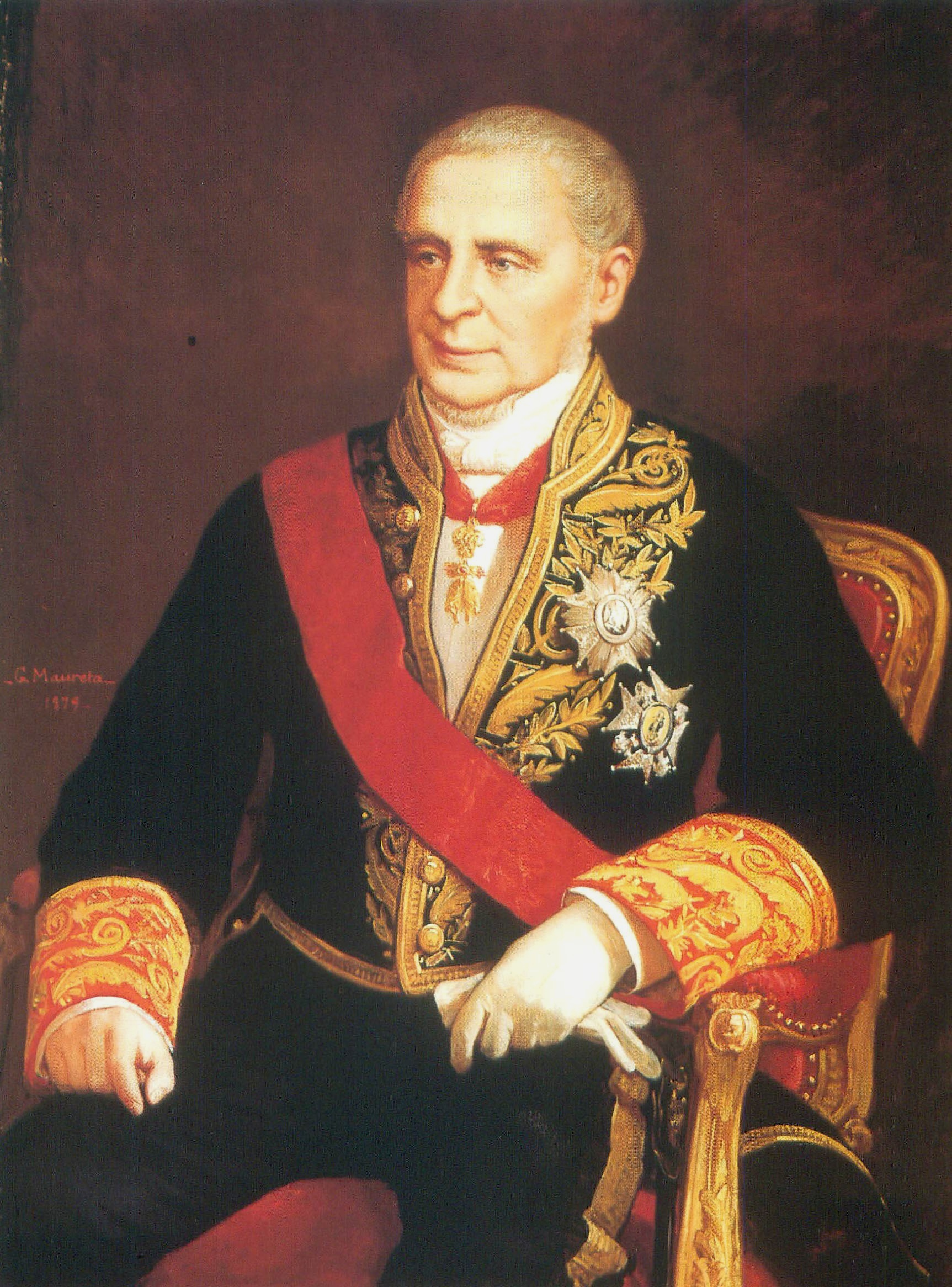 Retrato del aristócrata, político e historiador español Manuel Pando Fernández de Pinedo (1792-1872), marqués de Miraflores y de Pontejos, conde de Villapaterna y de la Ventosa, señor de Villargarcía del Pinar y de Miraflores, caballero de la Orden del Toisón de Oro, caballero gran cruz de la Orden de Carlos III y caballero de la Legión de Honor francesa y de la Orden de Cristo portuguesa. Y también fue presidente del Consejo de Ministros de España en dos ocasiones durante el reinado de Isabel II de España y también ministro de la Gobernación y de Estado y presidente del Senado.